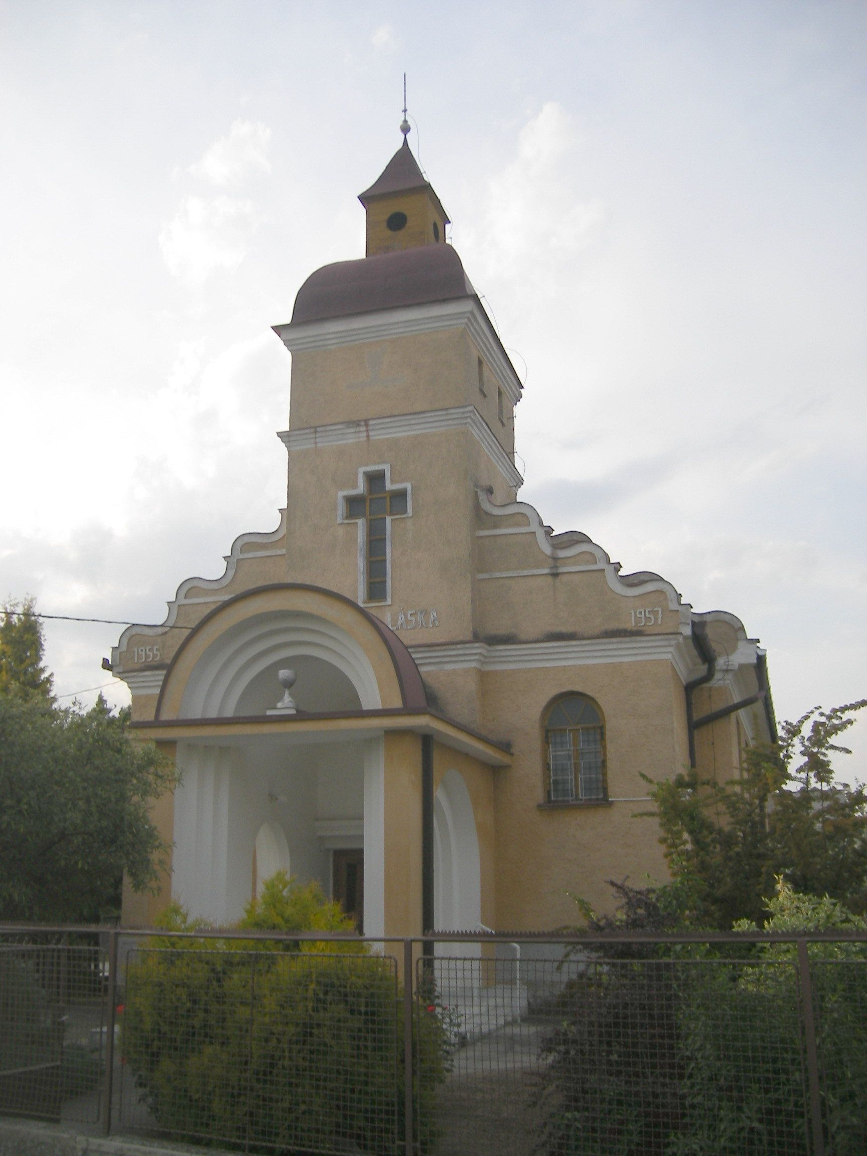 Naszvad - Baptista templom